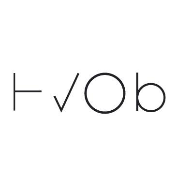 Logo der Band Her Voice Over Boys